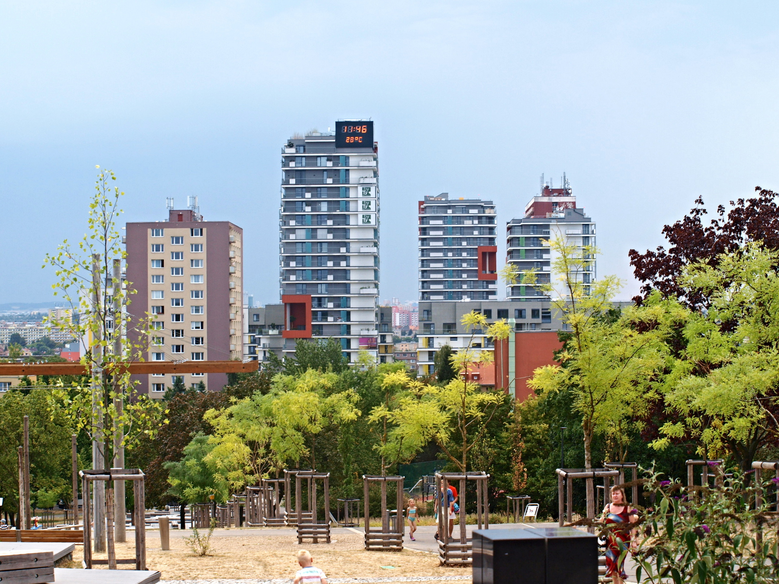 Malešice